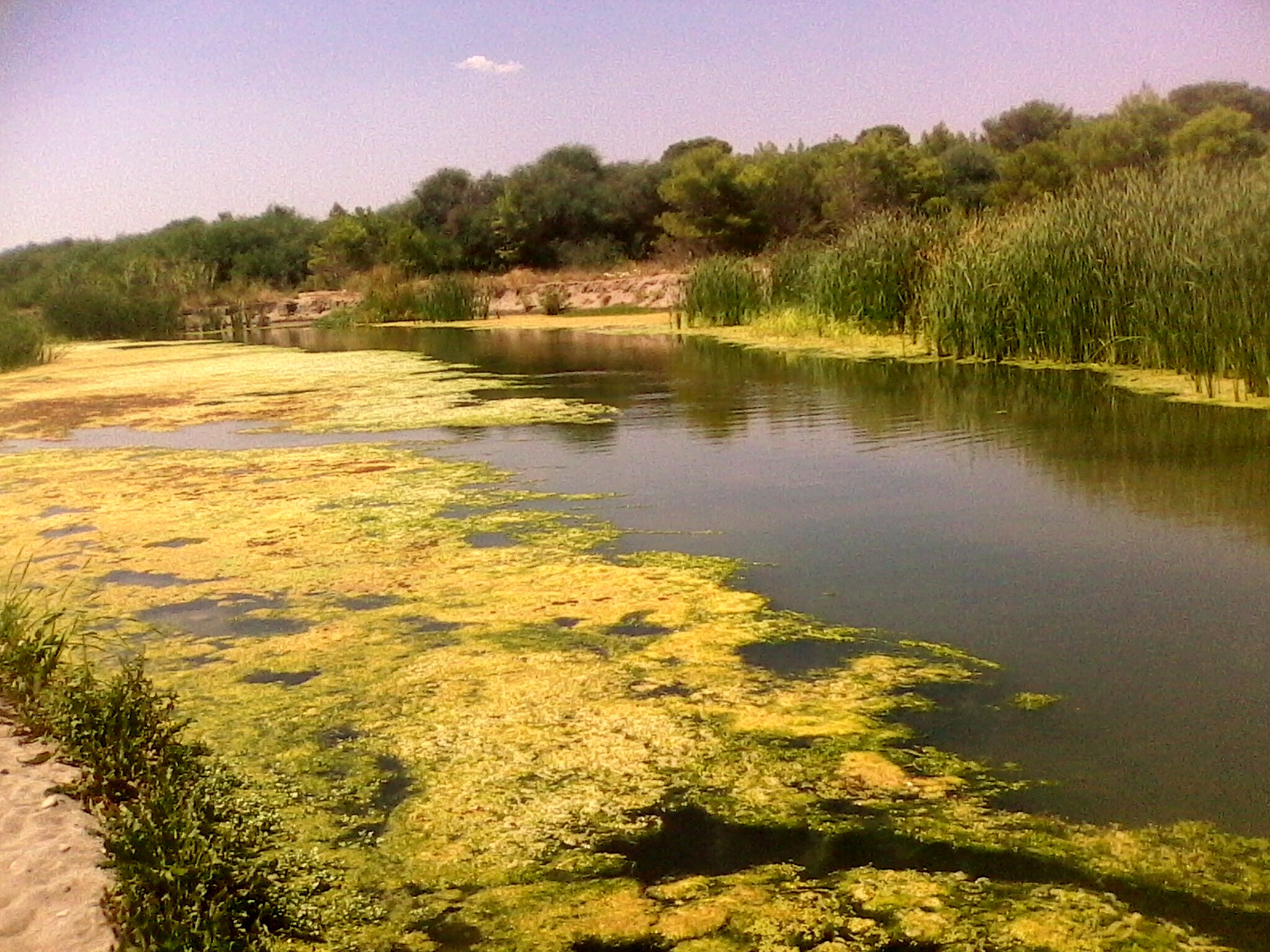 Bosco di Policoro This is a photo of a monument which is part of cultural heritage of Italy. The authorisation for taking photos of this object was provided by the World Wide Fund for Nature Italy.